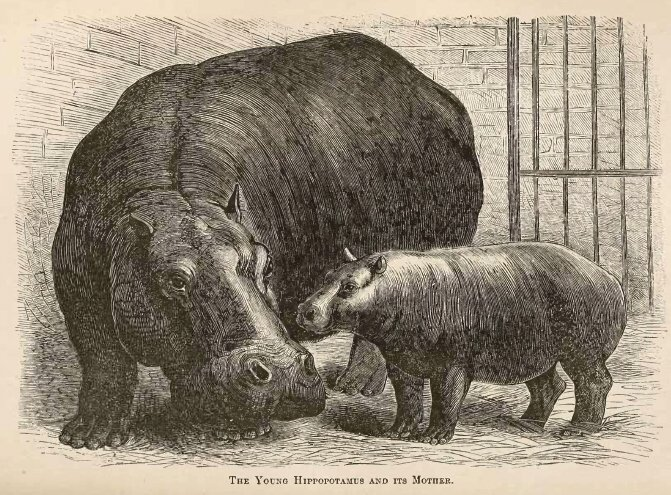 Flusspferd Adhela mit Jungem Guy Fawkes, dem ersten im Londoner Zoo geborenen und am Leben gebliebenen Flusspferd. (Holzstich)